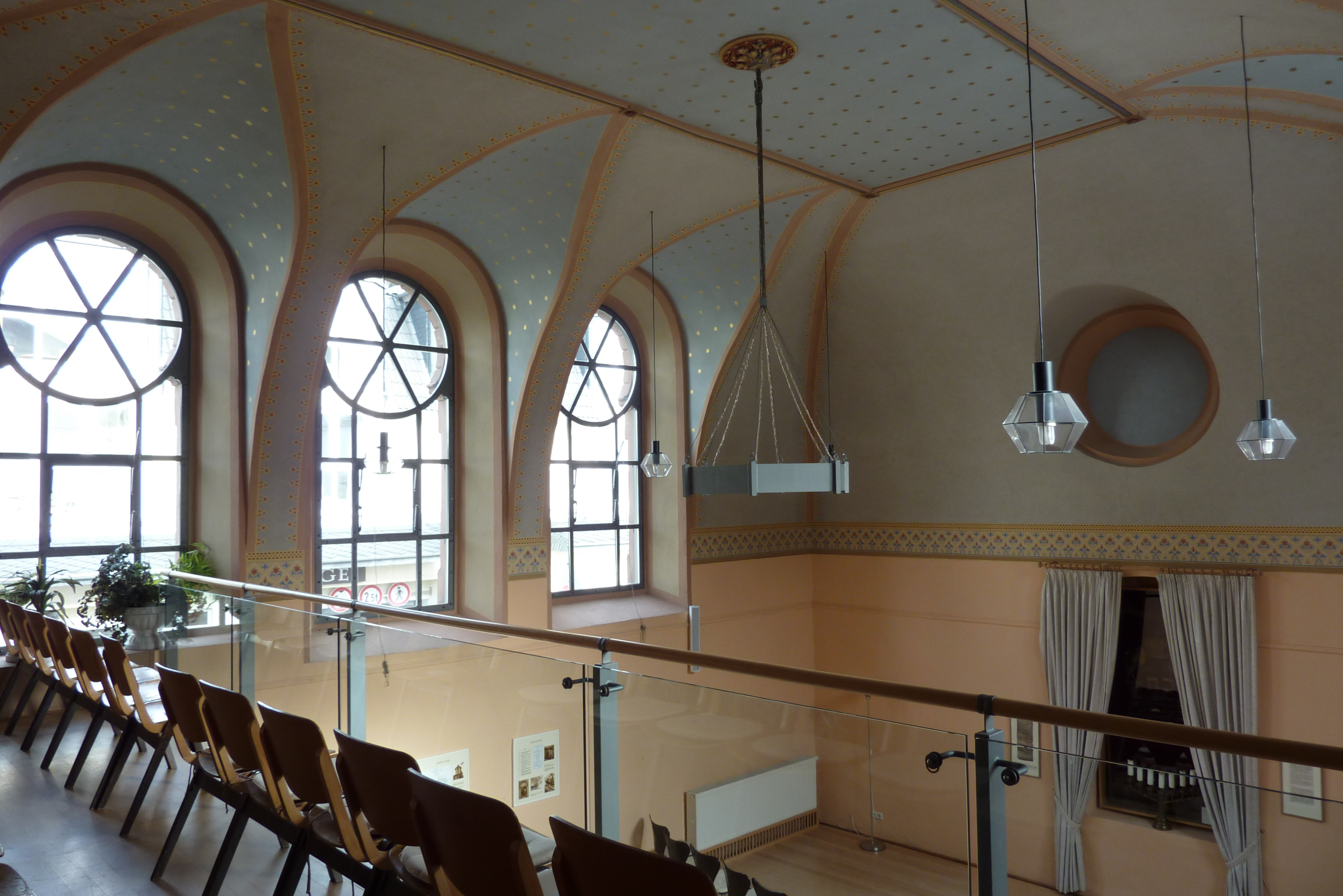 ehemalige Synagoge in Ahrweiler, Blick von der Frauenempore